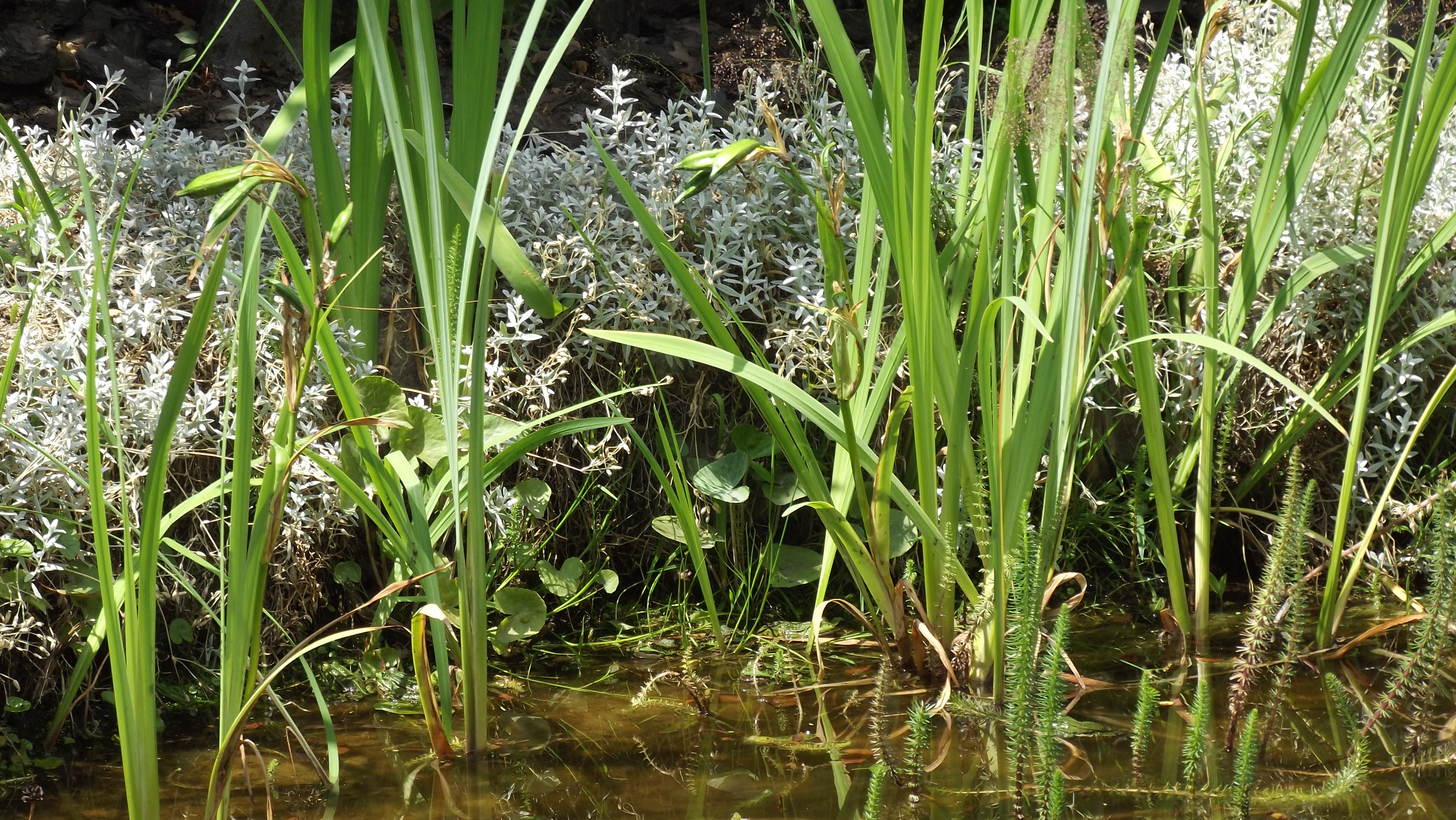 Strefa bagienna w przydomowym oczku wodnym